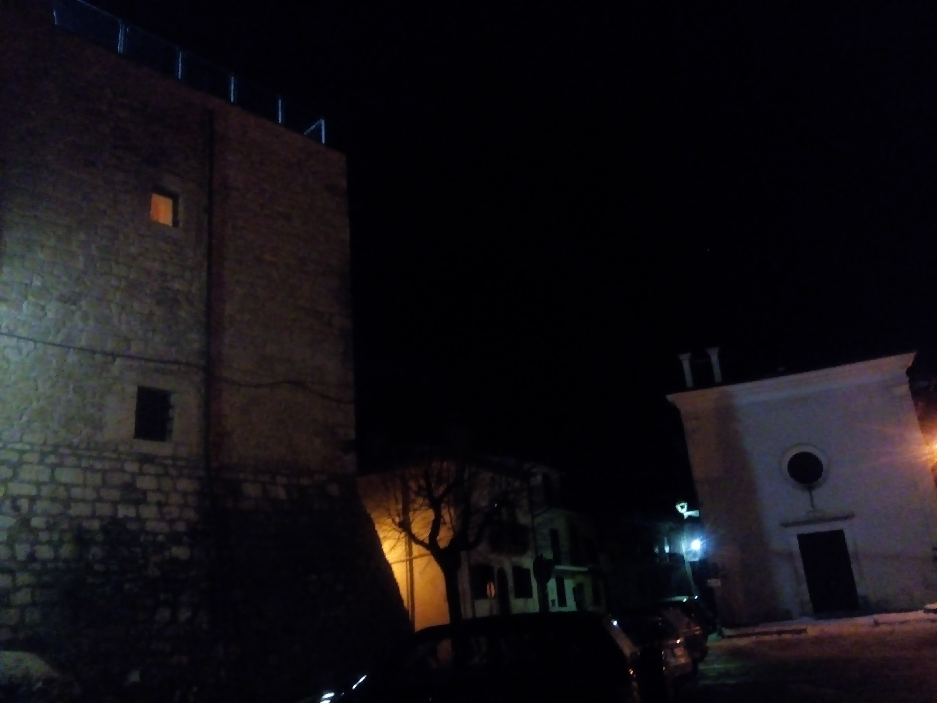 Veduta notturna della torre e della chiesa di San Rocco a Collelongo